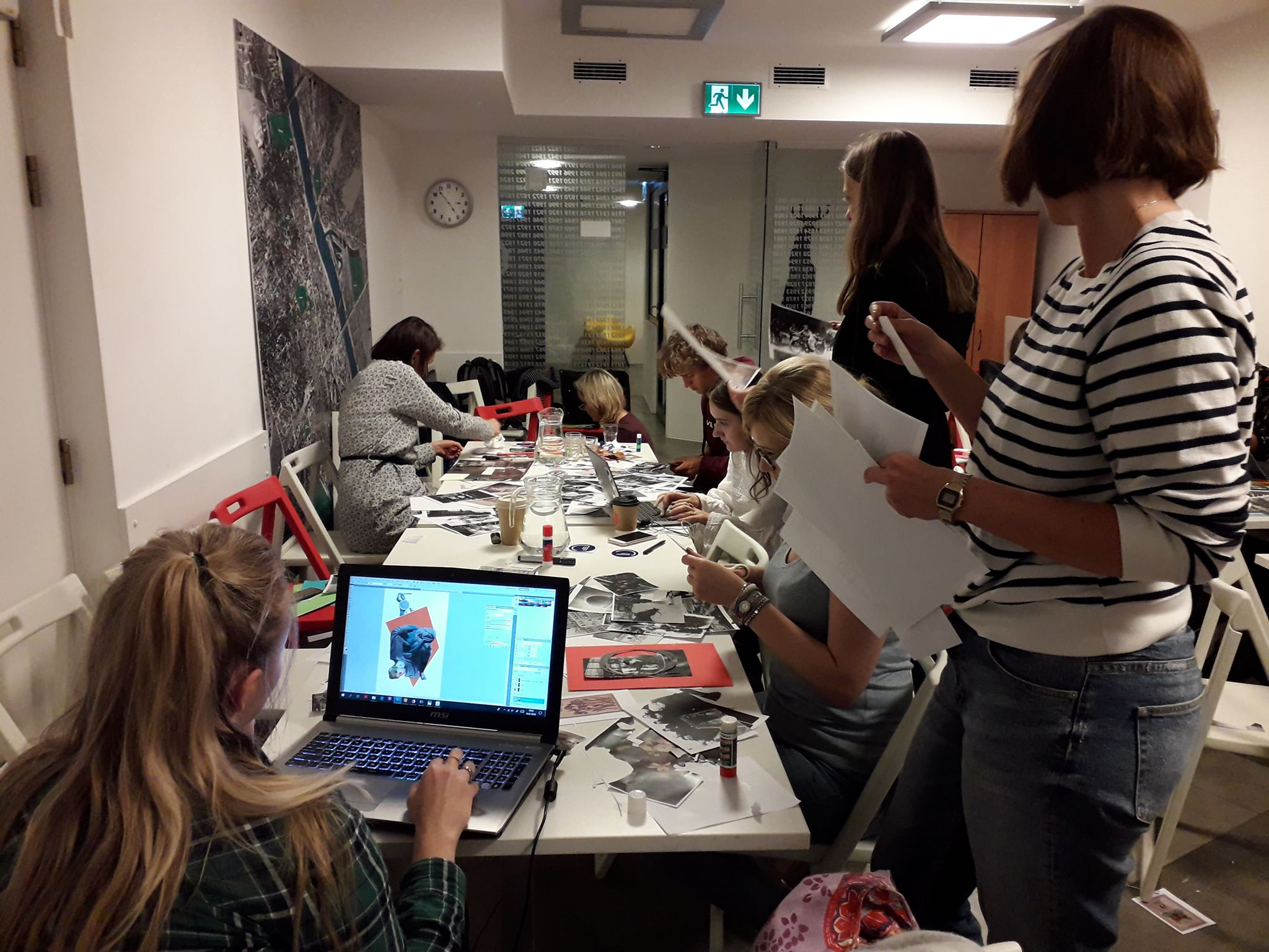 Zdjęcie zostało zrobione podczas warsztatów tworzenia warszawskich kolaży w dniu 18 lipca 2019 roku w Domu Spotkań z Historią w Warszawie. Wydarzenie zostało zorganizowane w ramach projektu "Poużywaj sobie!" prowadzonego przez Centrum Cyfrowe. Wikimedia Polska była Partnerem wydarzenia. Warsztat był prowadzony przez Zuzanne Dolege.